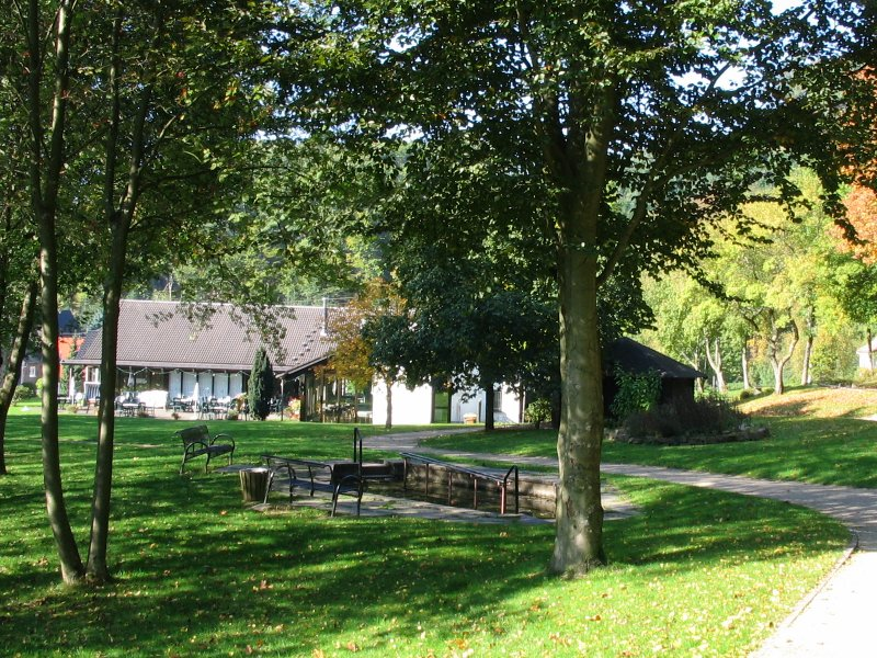 Haus des Gastes in Oberhundem in der Gemeinde Kirchhundem, NRW, Deutschland